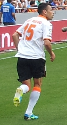 Javi Fuego